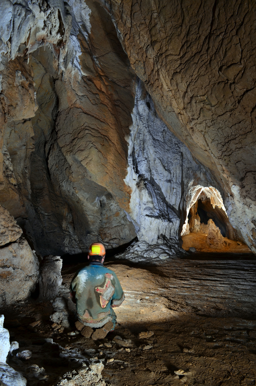 Goikolauko koba (Berriatua, Bizkaia). Barruko ikuspegia.